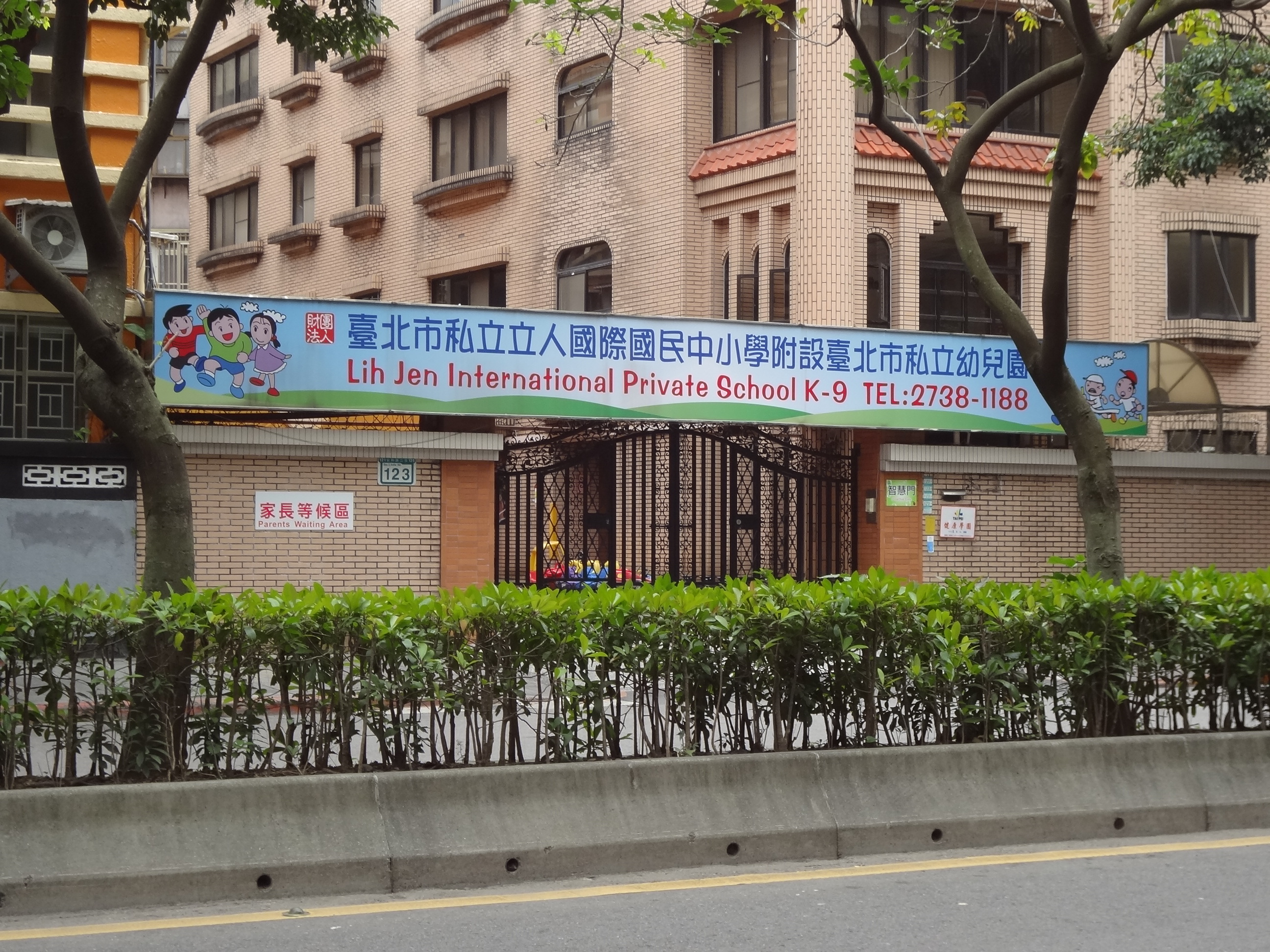 臺北市私立立人國際國民中小學附設幼兒園，地址：臺北市大安區安和路二段123號。